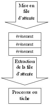 schema d'une file d'attente